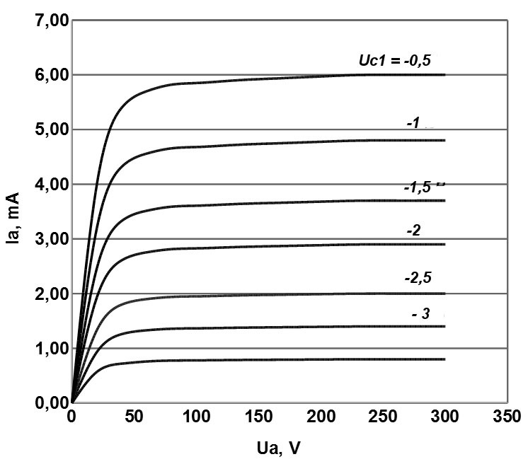 Pentodenkennlinie